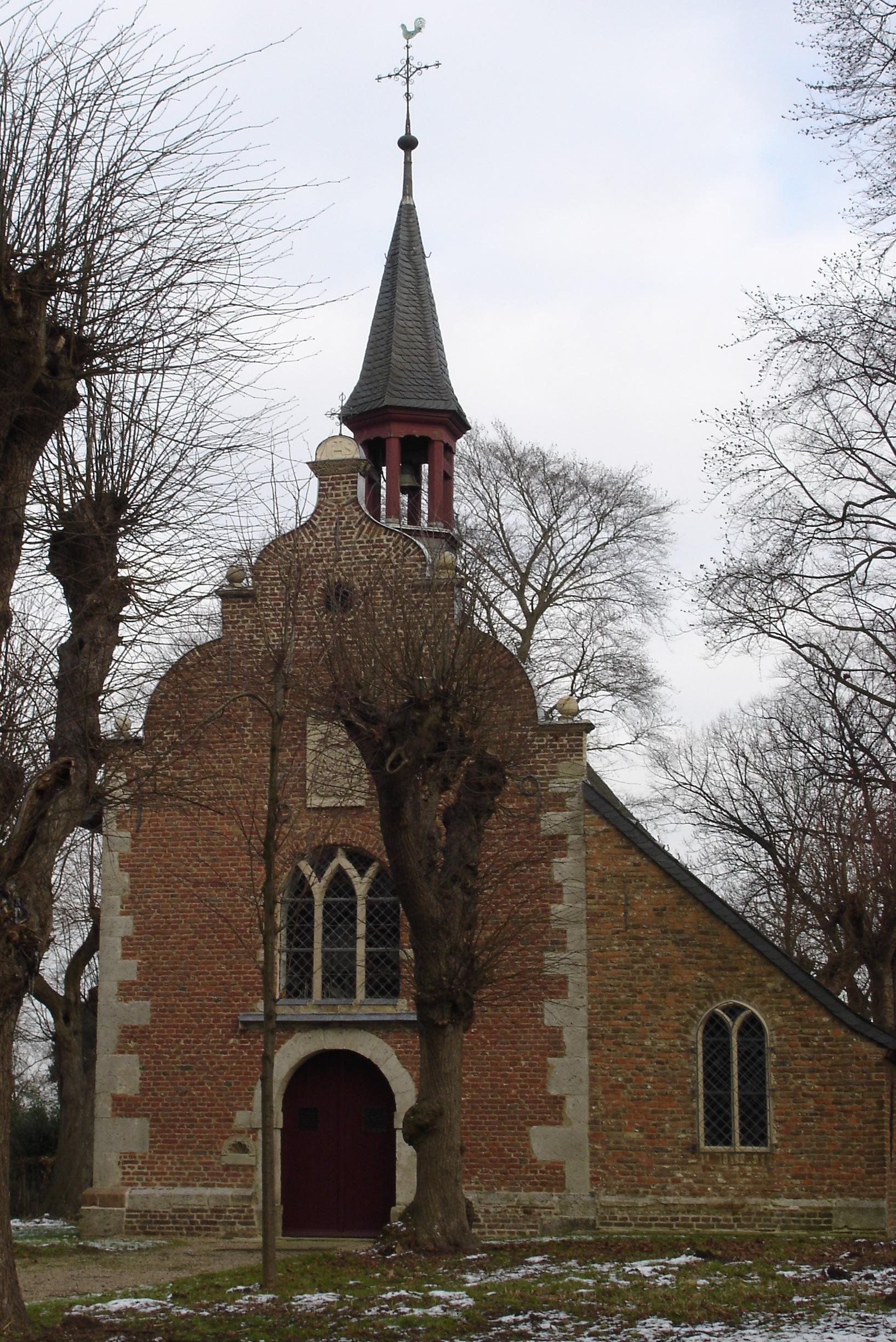 Kapelle des ehemaligen Kloster Fürstenberg in Xanten This is a photograph of an architectural monument.